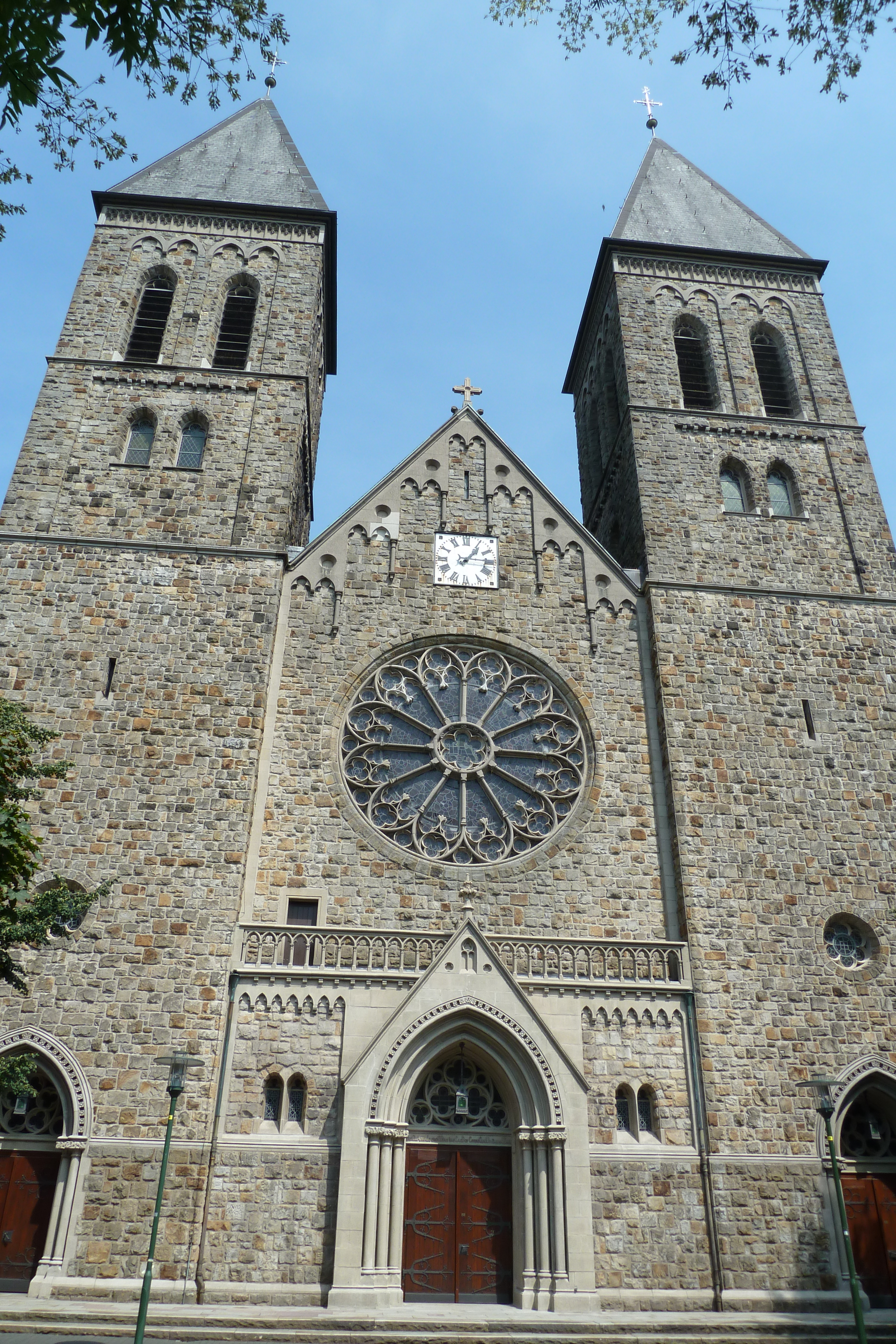 Die St.-Antonius-Kirche in Gronau (Westfalen).